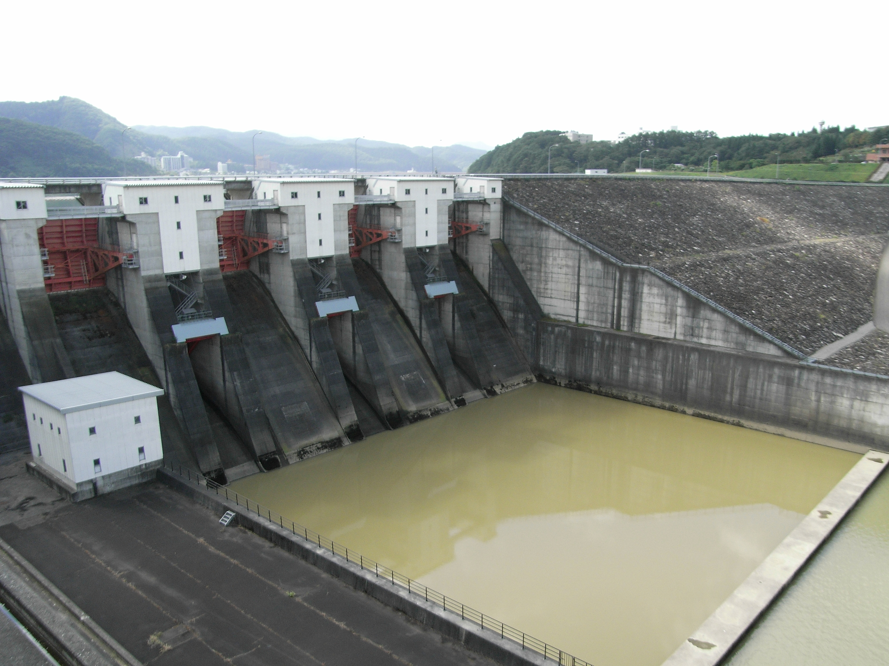 Dam